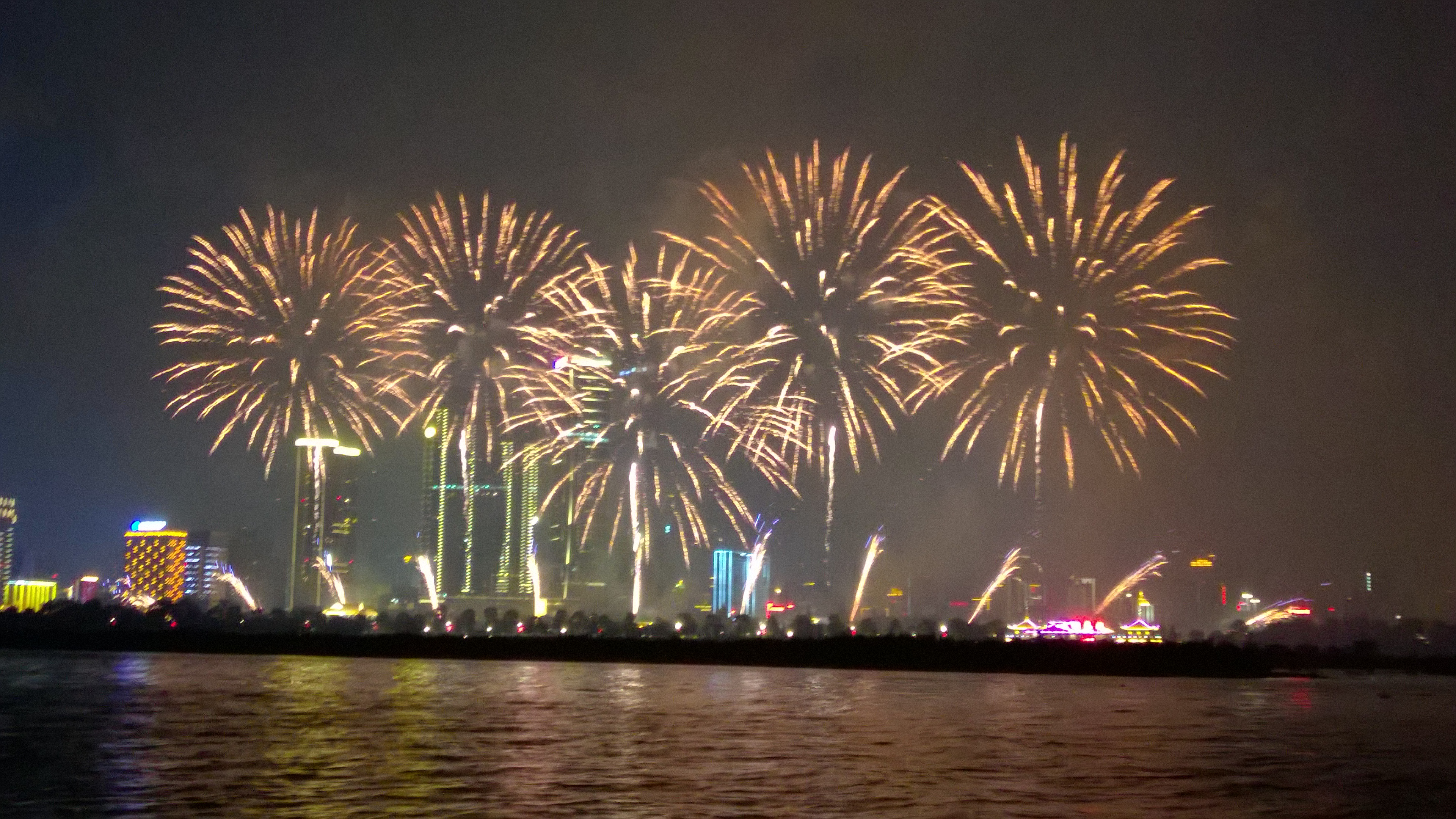 拍摄于橘子洲西岸的潇湘路